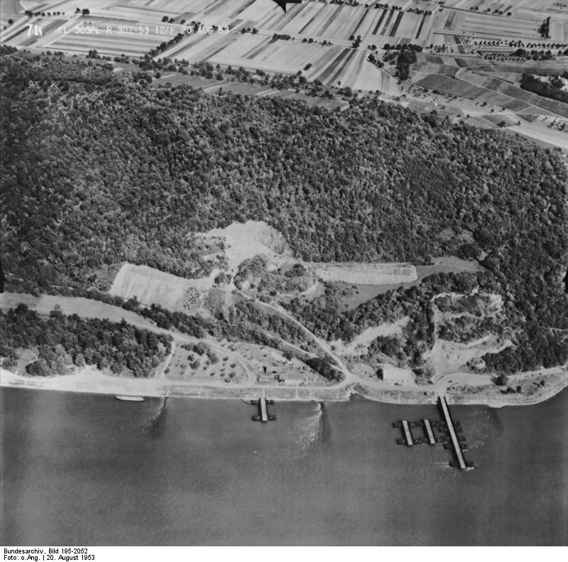 Rheinbefliegung der Alliierten 1953